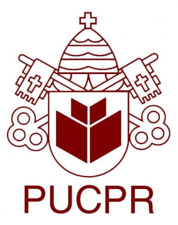 Pontifícia Universidade Católica do Paraná